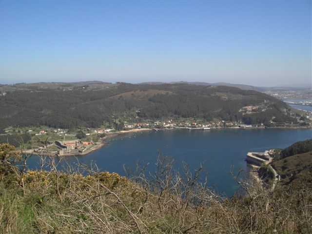 Ría de Ferrol, Galicia, Spain. Entre castelos